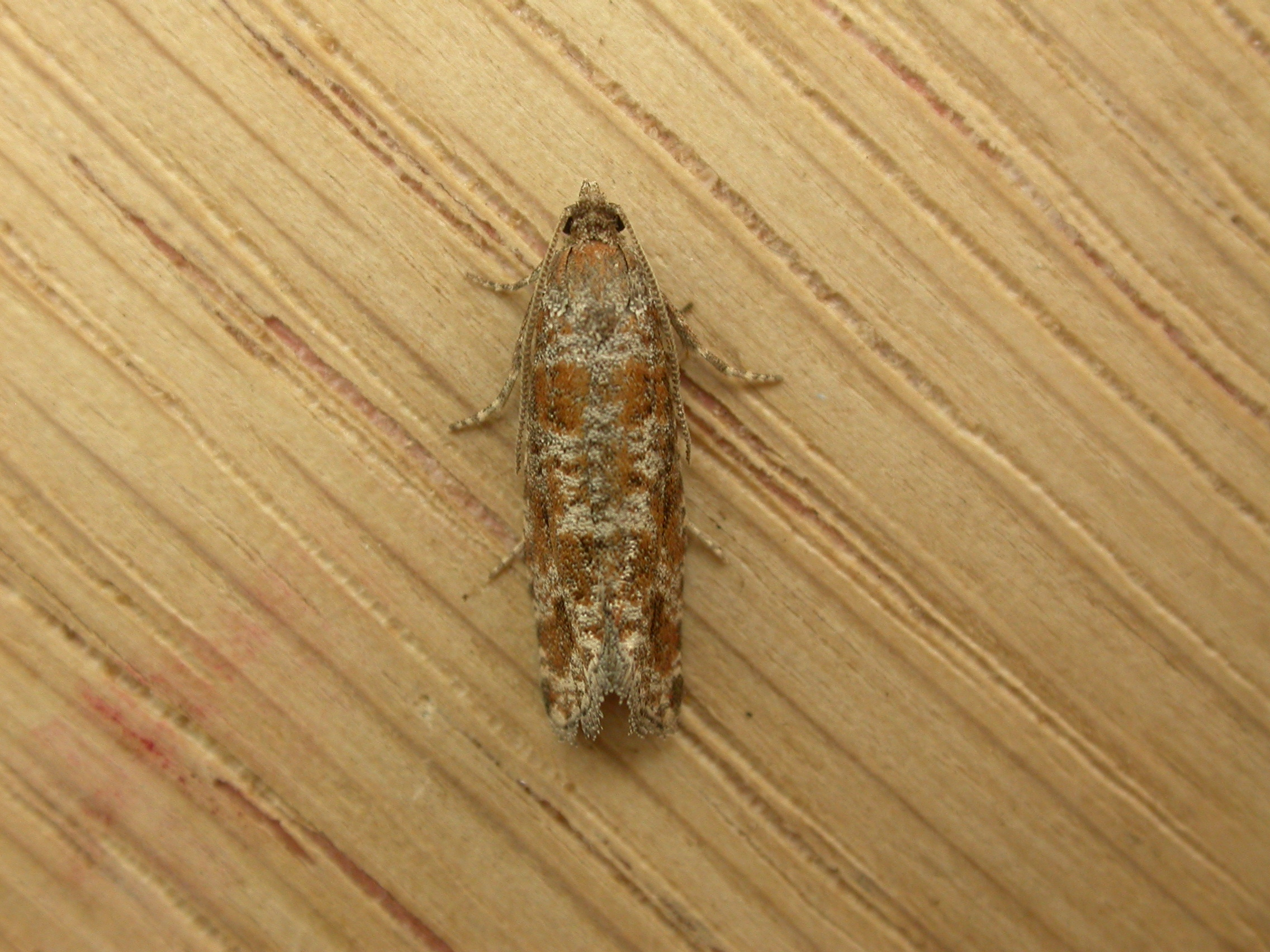 Rhyacionia pinivorana (Lienig & Zeller, 1846), to Robinson trap, Hellerup, Denmark, 16/17 June 2012